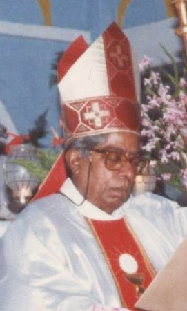 Joseph Gabriel Fernandez, Bischof von Quilon, 1978-2001